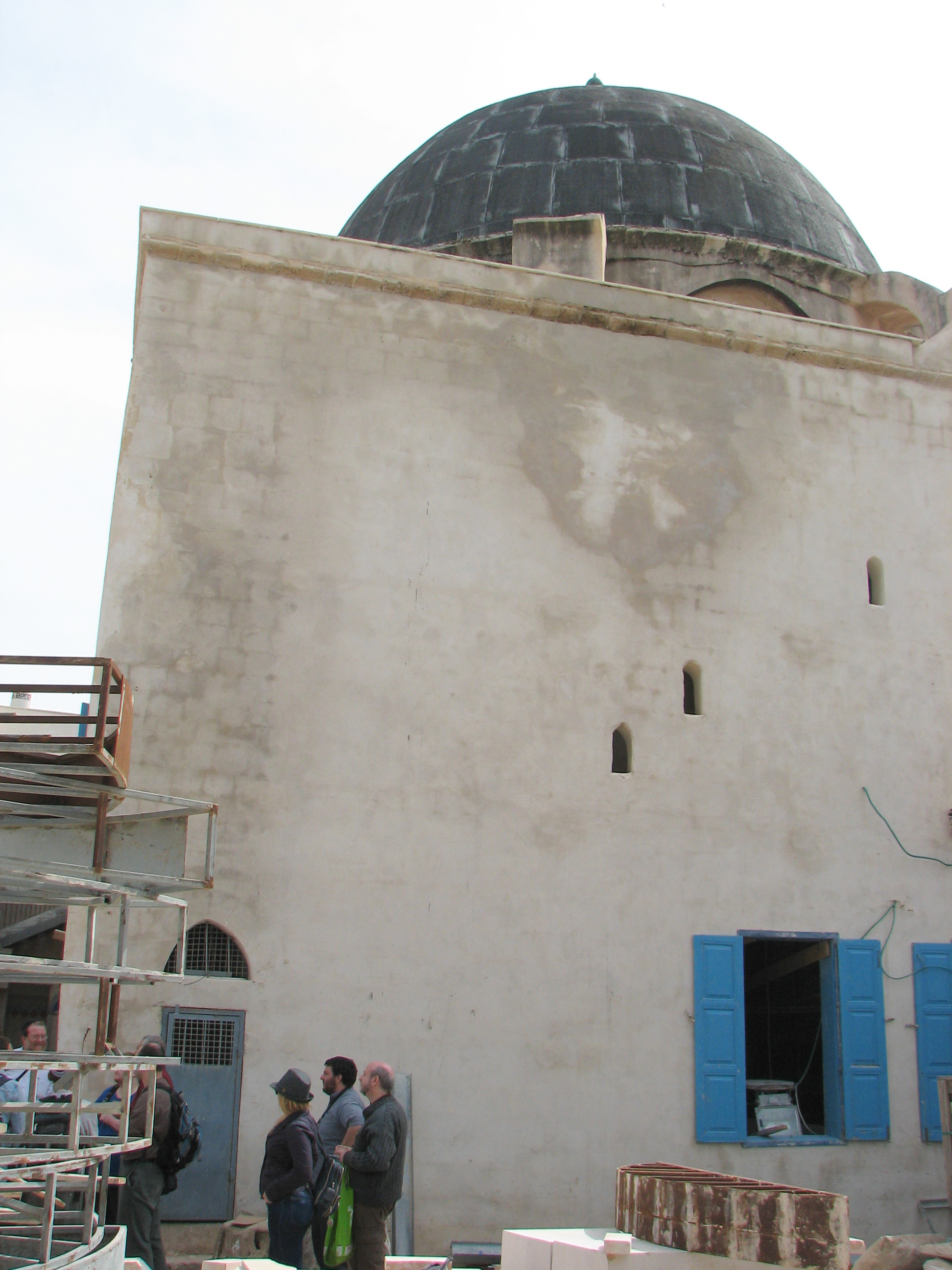 Akko, El Shazliya Mosque under construction. The cost of construction is estimate 80 M $ מסגד אל -שאזליה בעכו. מרכז השאזלים נמצא בלבנון. במשך שנים מרכז זה נזנח והשוכרים הרחיבו את בתיהם. השאזלים החליטו לשפץ אץ המקום הם פינו את הדיירים תוך מתן פיצויים והחלו בשיפוץ האתר הכולל מסגד מבנים וקברים. ההשקעה המוערכת במבנה באתר היא 80 מליון דולר This image was taken as part of the Elef Millim project trip to the Old City of Acco, which was held on Friday, 5th March 2010. To view all images uploaded as pary of the Elef Millim Project מבנה המסגד בתוך האתר